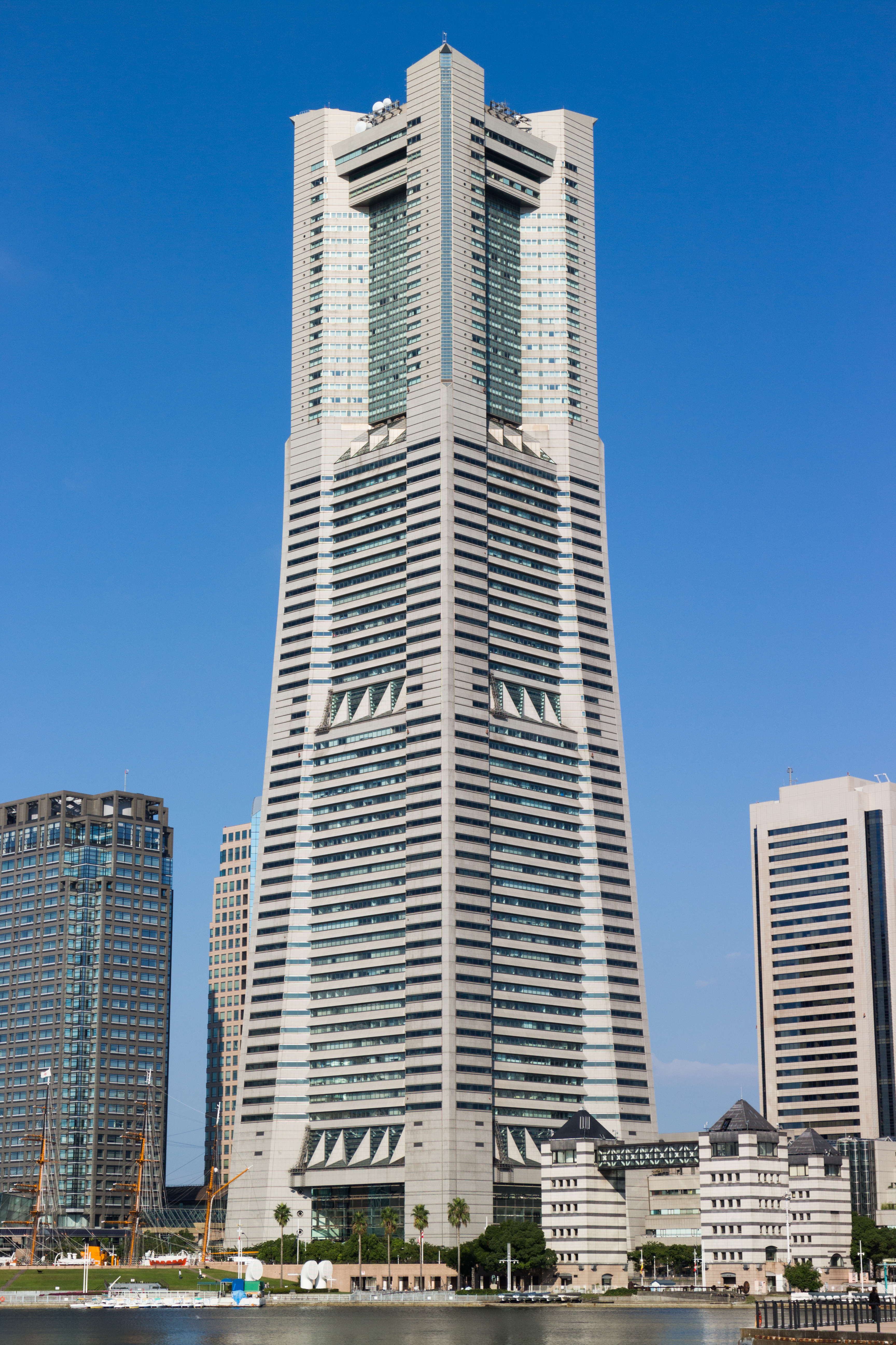 横浜ランドマークタワー